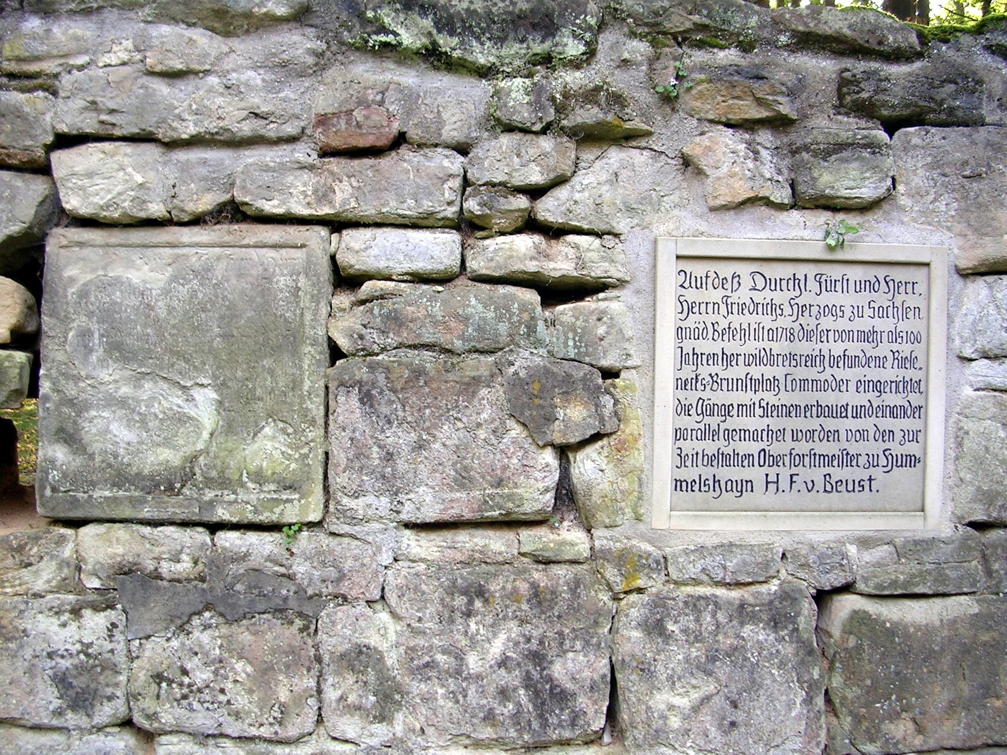 Hummelshain, Jagdanalage Rieseneck